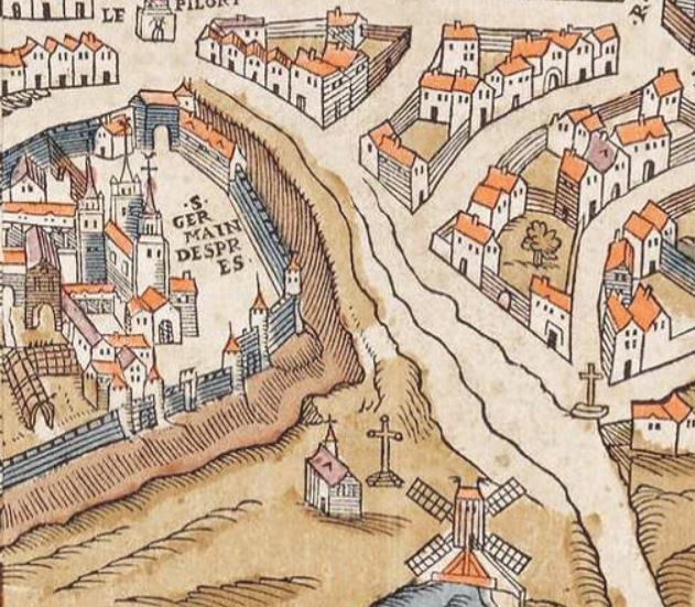 La rue Taranne sur le plan de Paris de Truchet (vers 1550)